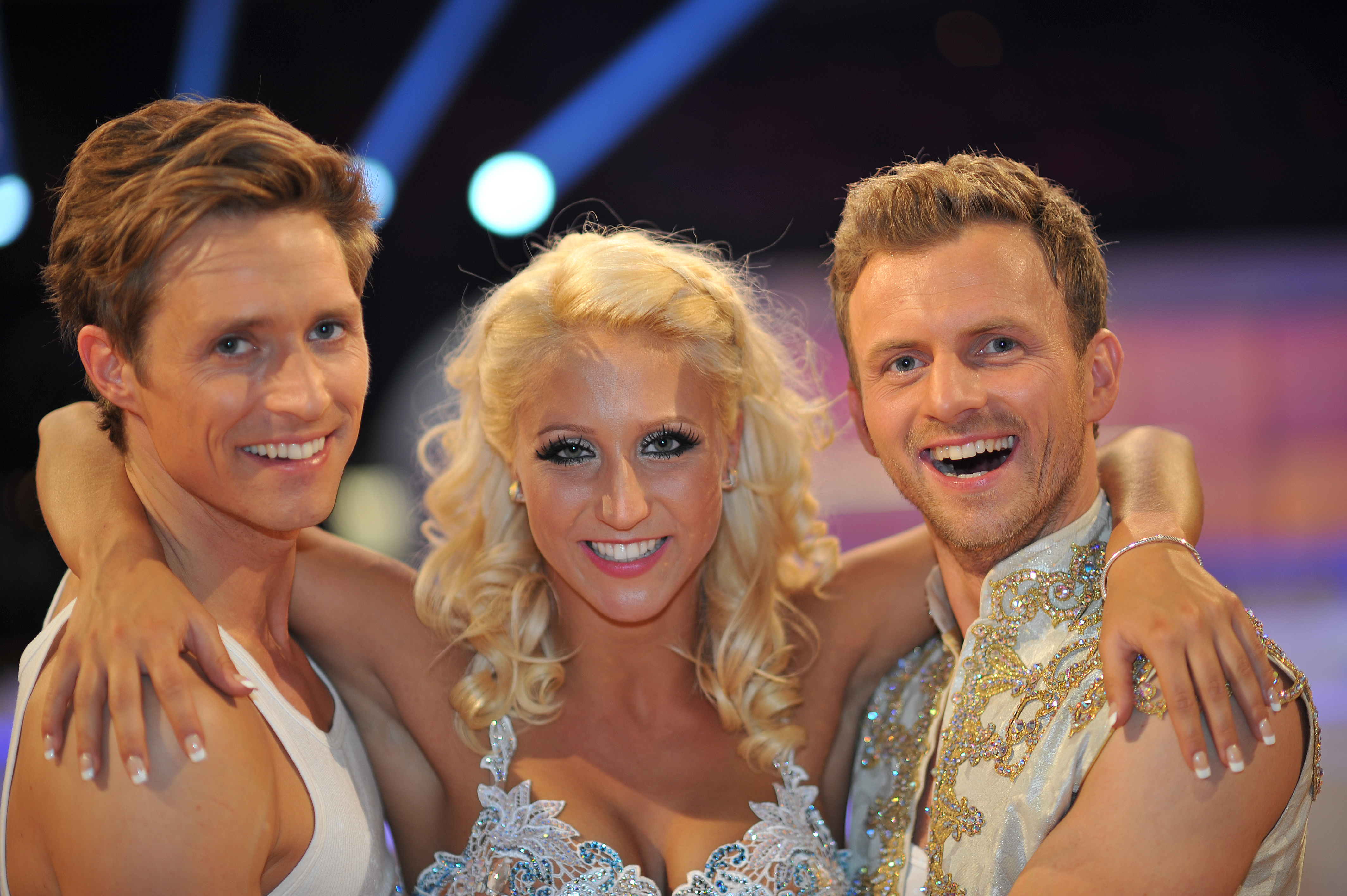 "Dancing Stars" am 24. Mai 2013: Lukas Perman, Kathrin Menzinger, Willi Gabalier